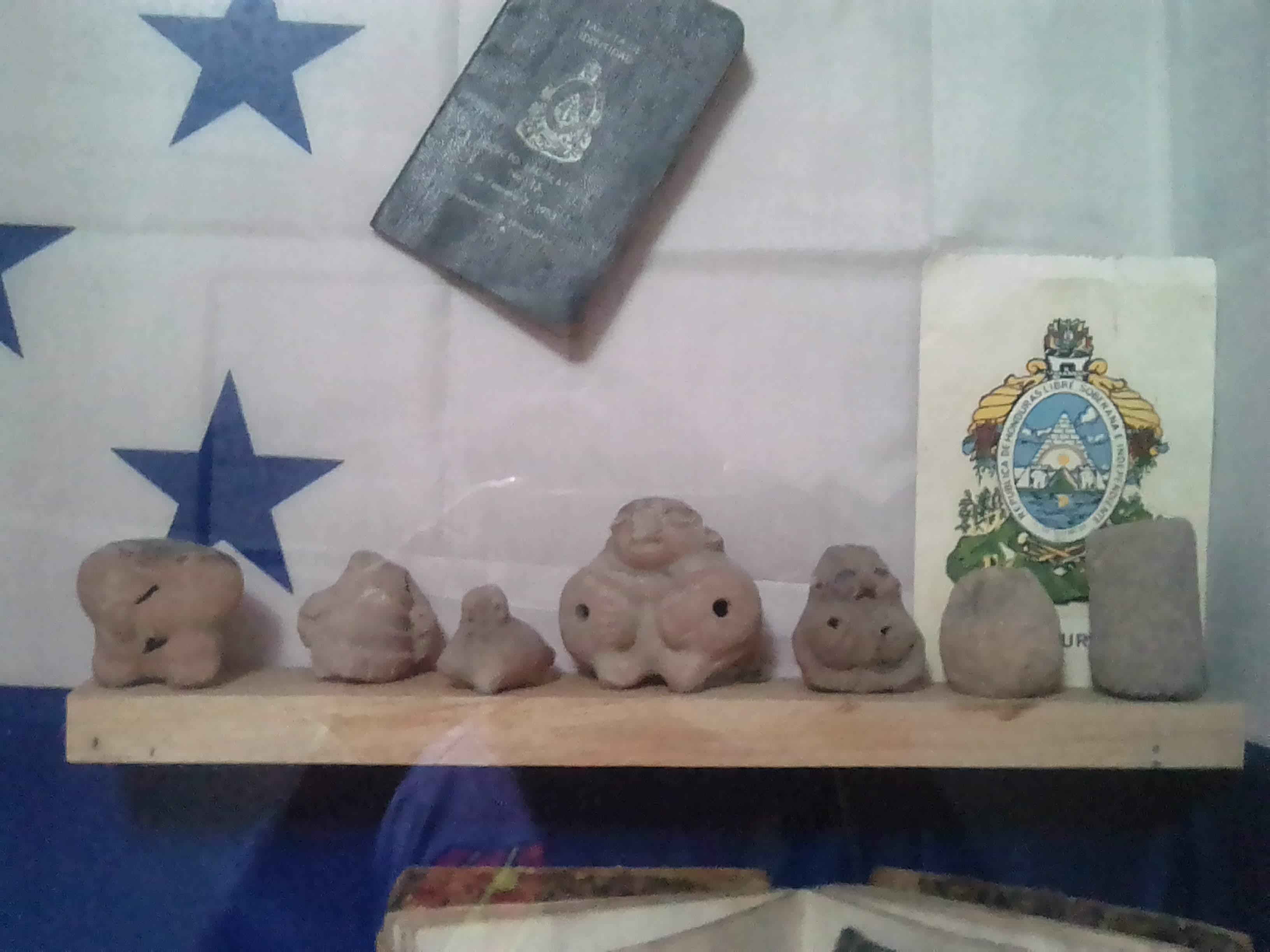 lencafigurillas